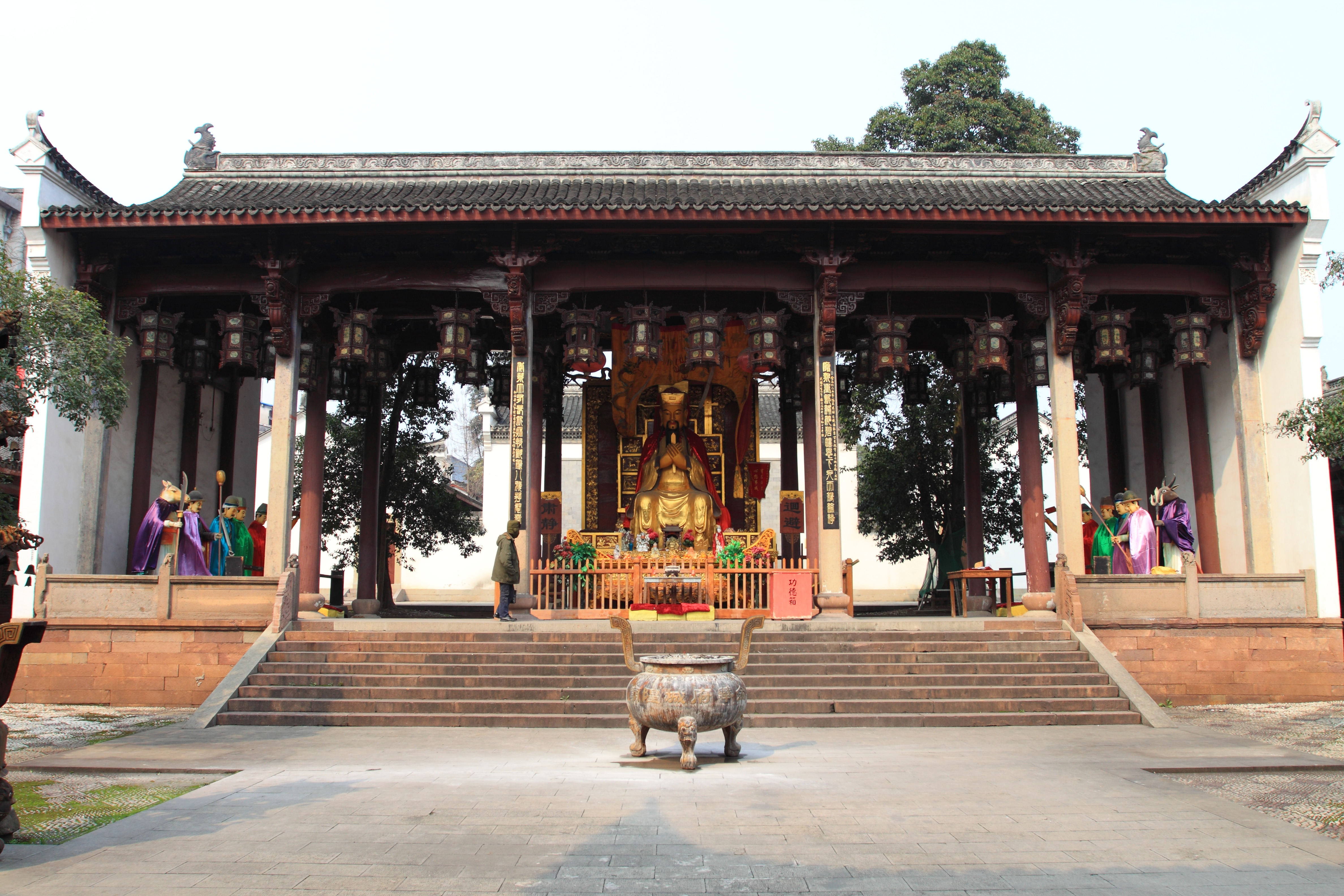 中国浙江省金华府城隍庙正厅